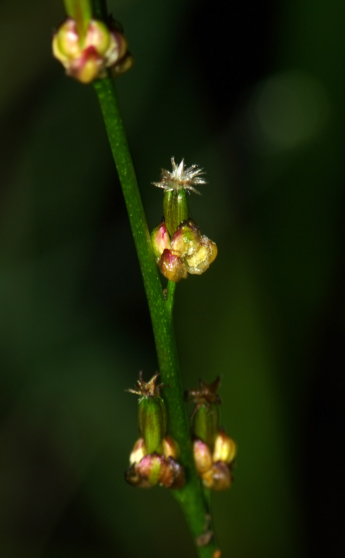 Świbka błotna (Triglochin palustris)